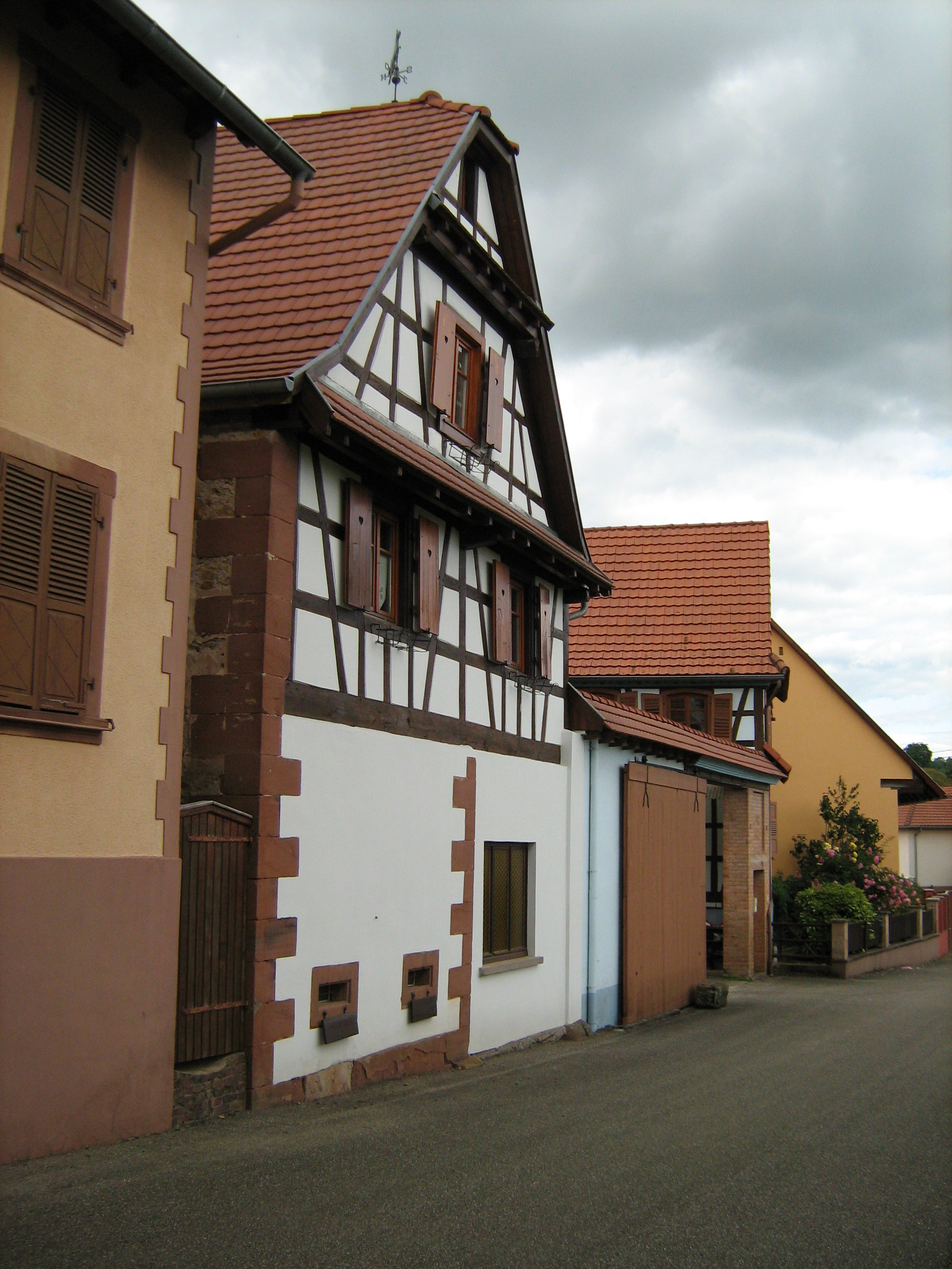 rue à Alteckendorf